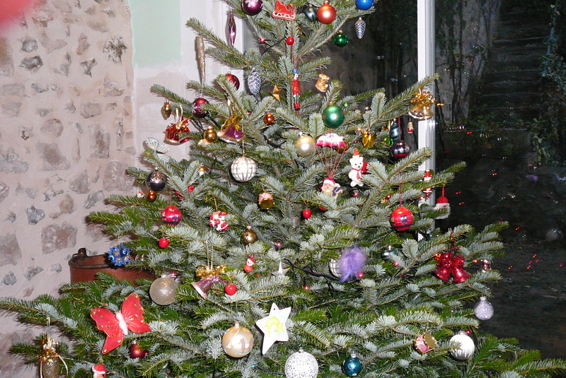 Sapin de Noël.